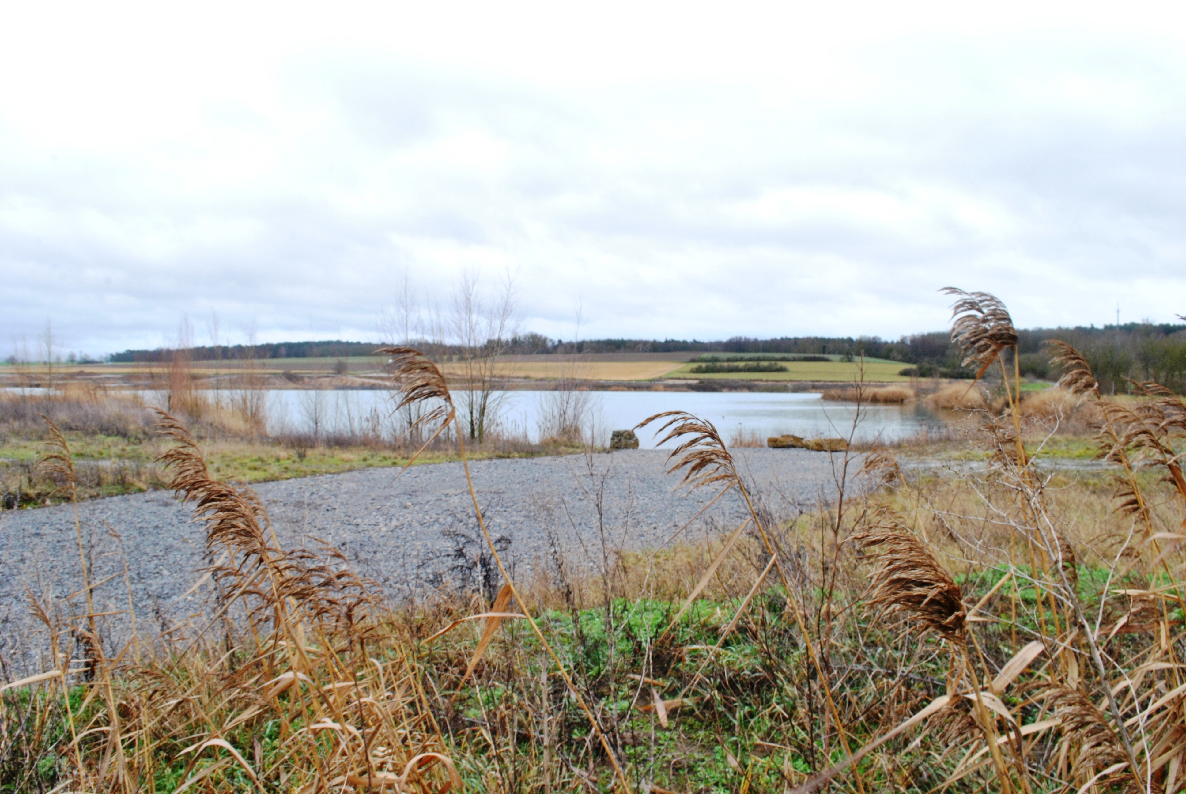 Hörblacher Seengebiet, mehrere Baggerseen im Osten des Ortsteils Hörblach von Schwarzach am Main